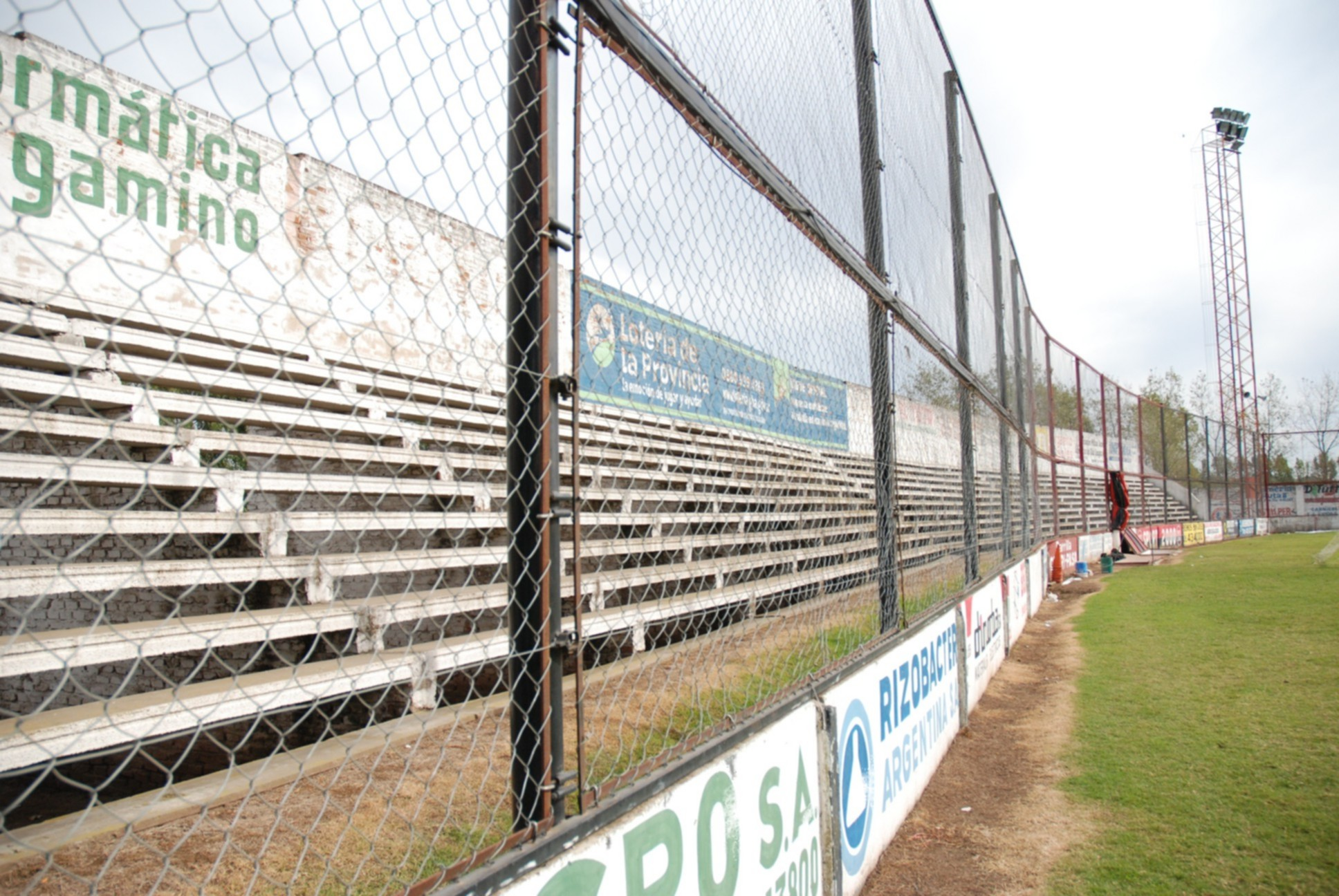 Estadio "Miguel Morales" del Club Atlético Douglas haig de Pergamino, provincia de Buenos Aires, Argentina